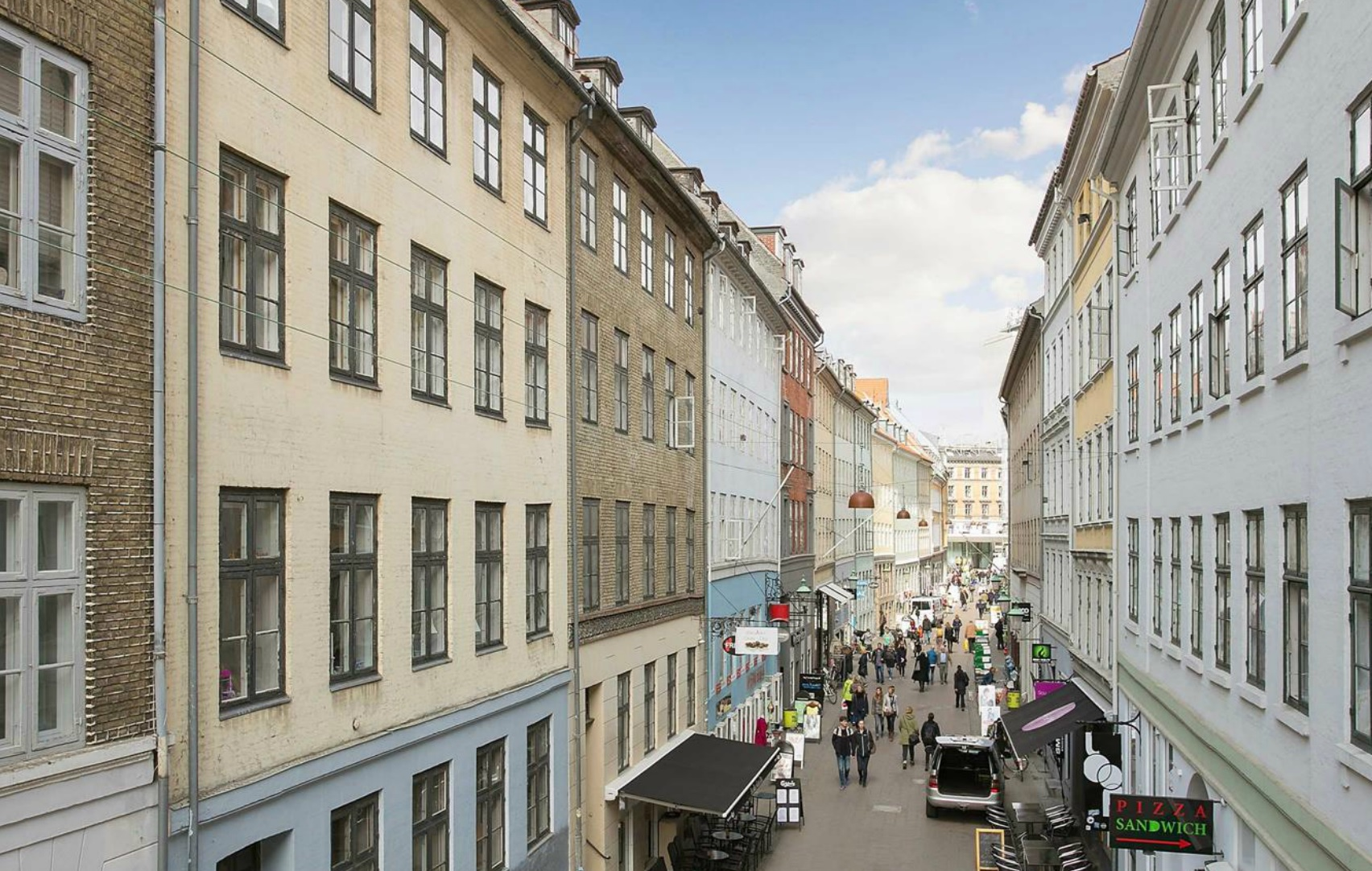 Fiolstræde set fra krystalgade, mod Nørreport